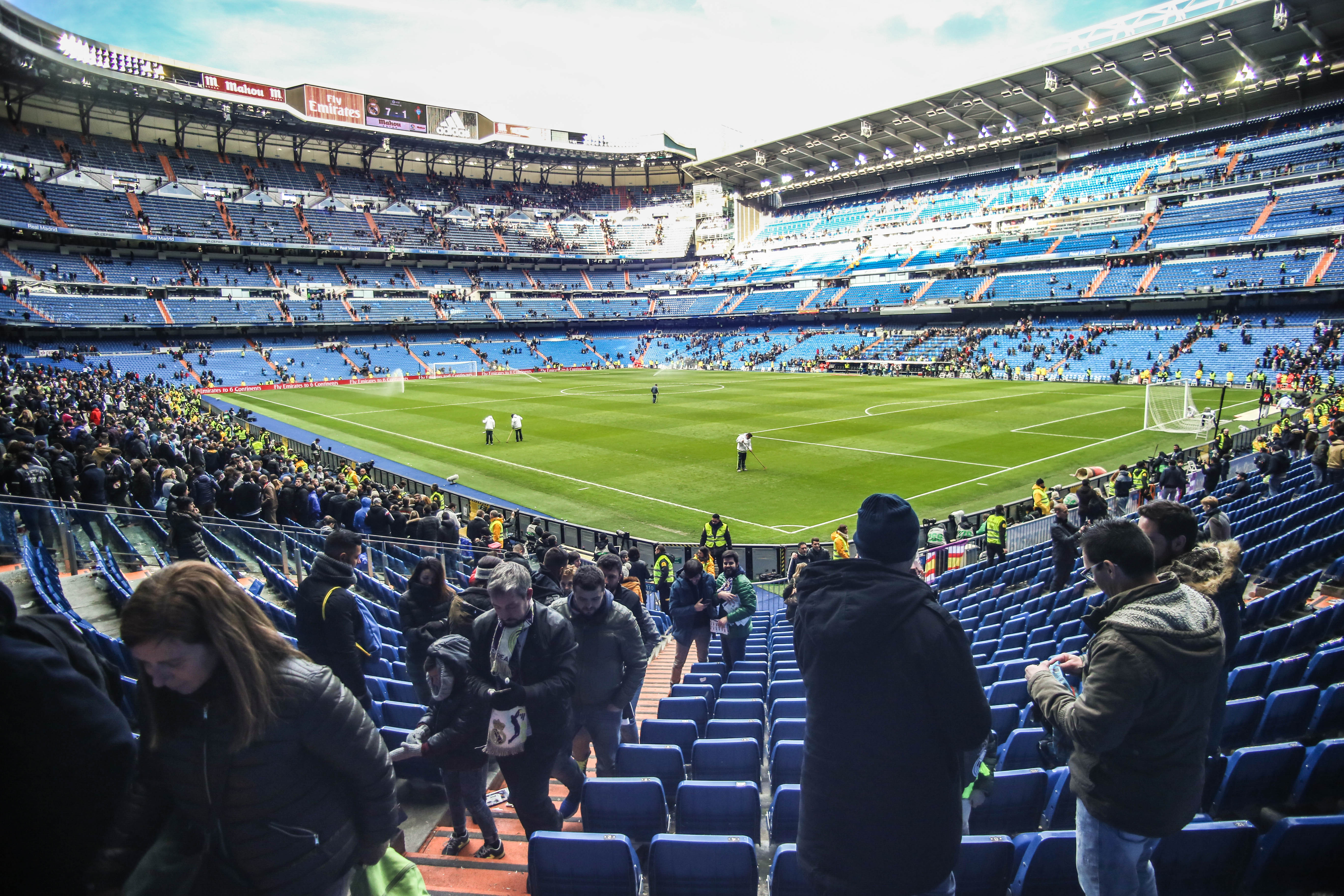 Estadio Santiago Bernabéu tras el partido entre el Real Madrid vs Celta de Vigo